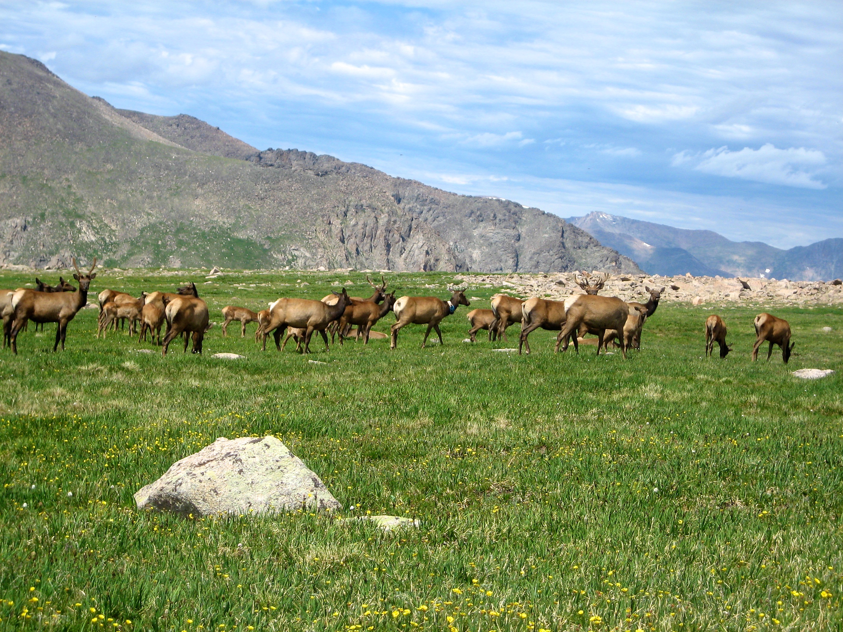 Elk on Flattop Mountain